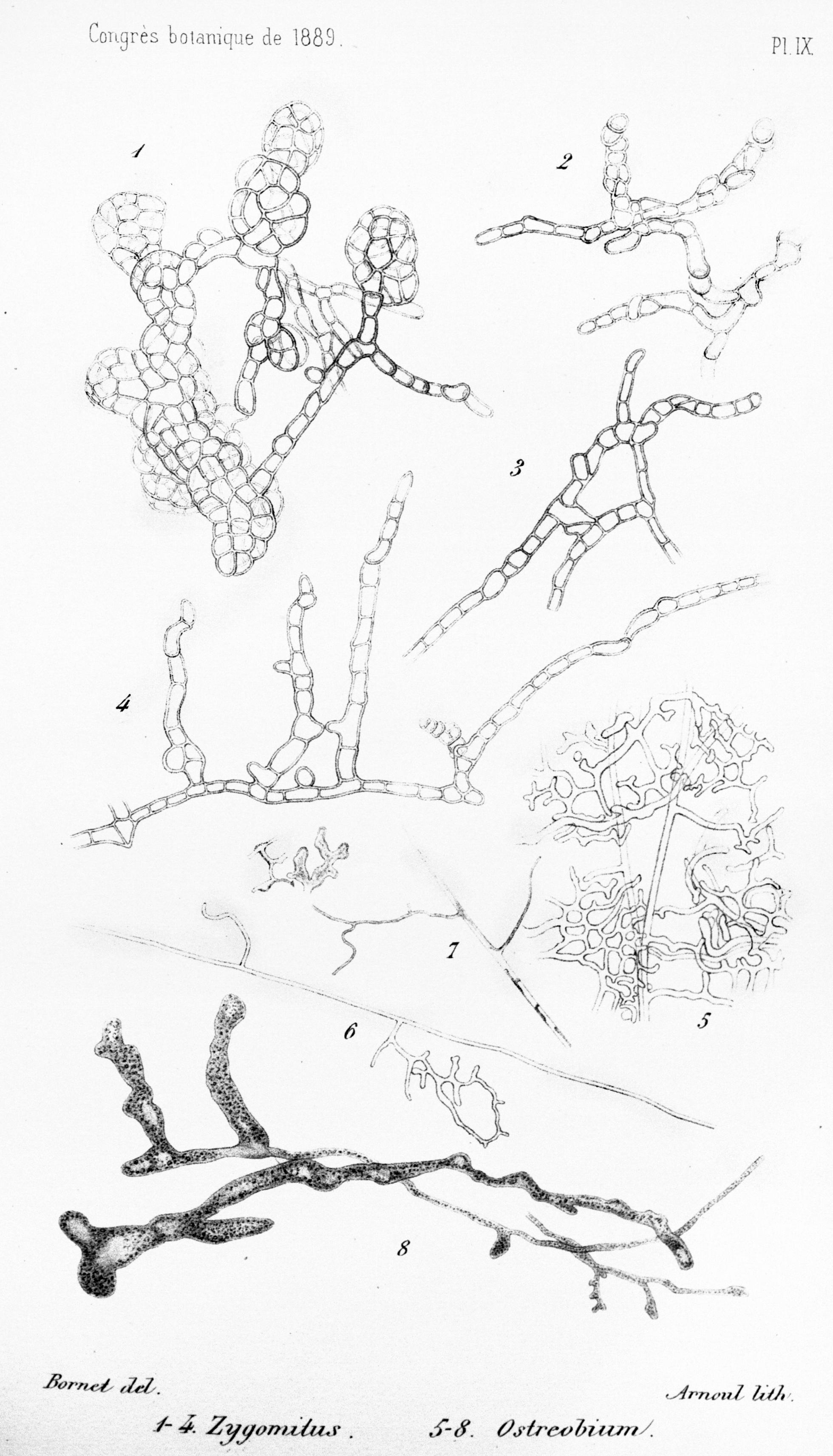 1-4. Zygomitus reticulatus Bornet & Flahault 5-8. Ostreobium quekettii Bornet & Flahault